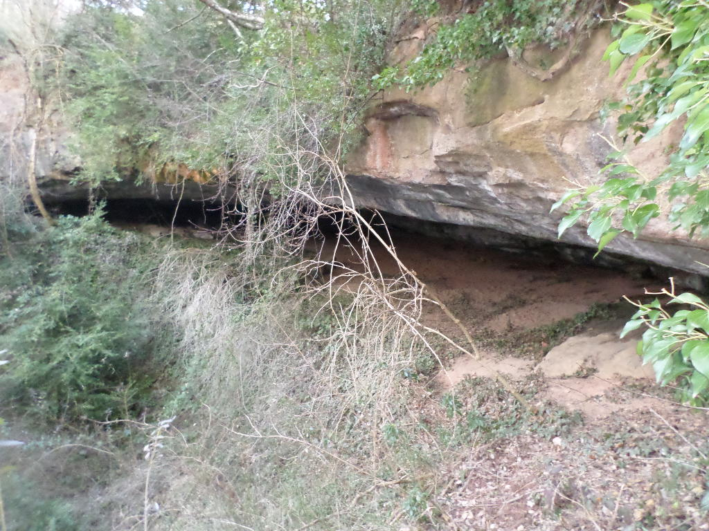 Imatge de la balma d'en Marimon i Casulleres, el dia 15 de febrer de 2015.